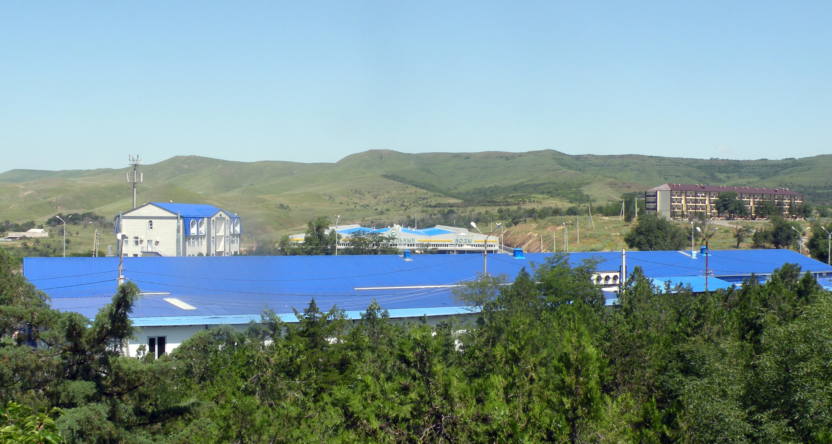 Завод "Чеченские минеральные воды" по производству безалкогольных напитков и природно-лечебной воды ТМ"Серноводская" около санатория Серноводск-Кавказский в Сунжеском районе ЧР, июнь 2016